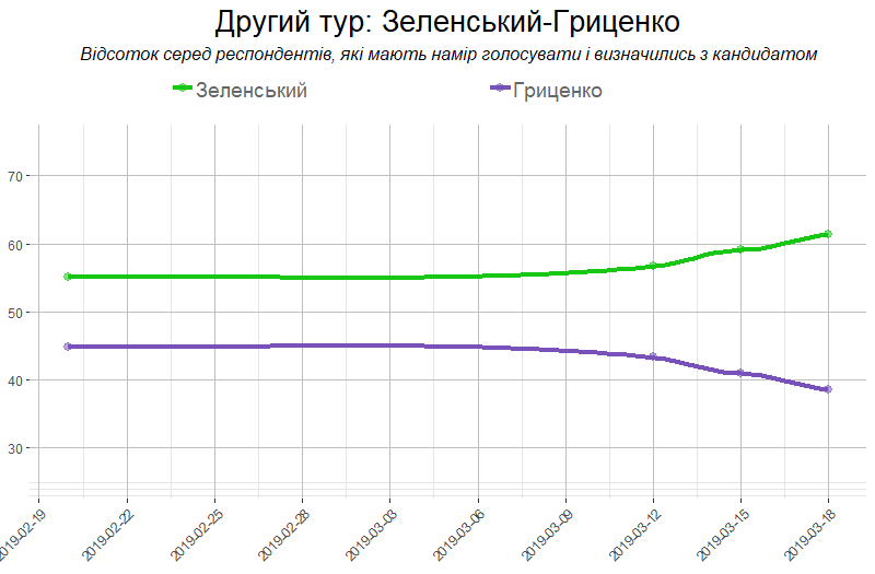 Графік побудований на основі даних авторитетних соціологічних компаний КМІС, Рейтинг, Центр Разумкова, Соціальний моніторинг, УІСД, СОЦИС, GfK. Дані для графіку містяться в статті вікіпедії "Вибори Президента України 2019 (соціологічні опитування)"